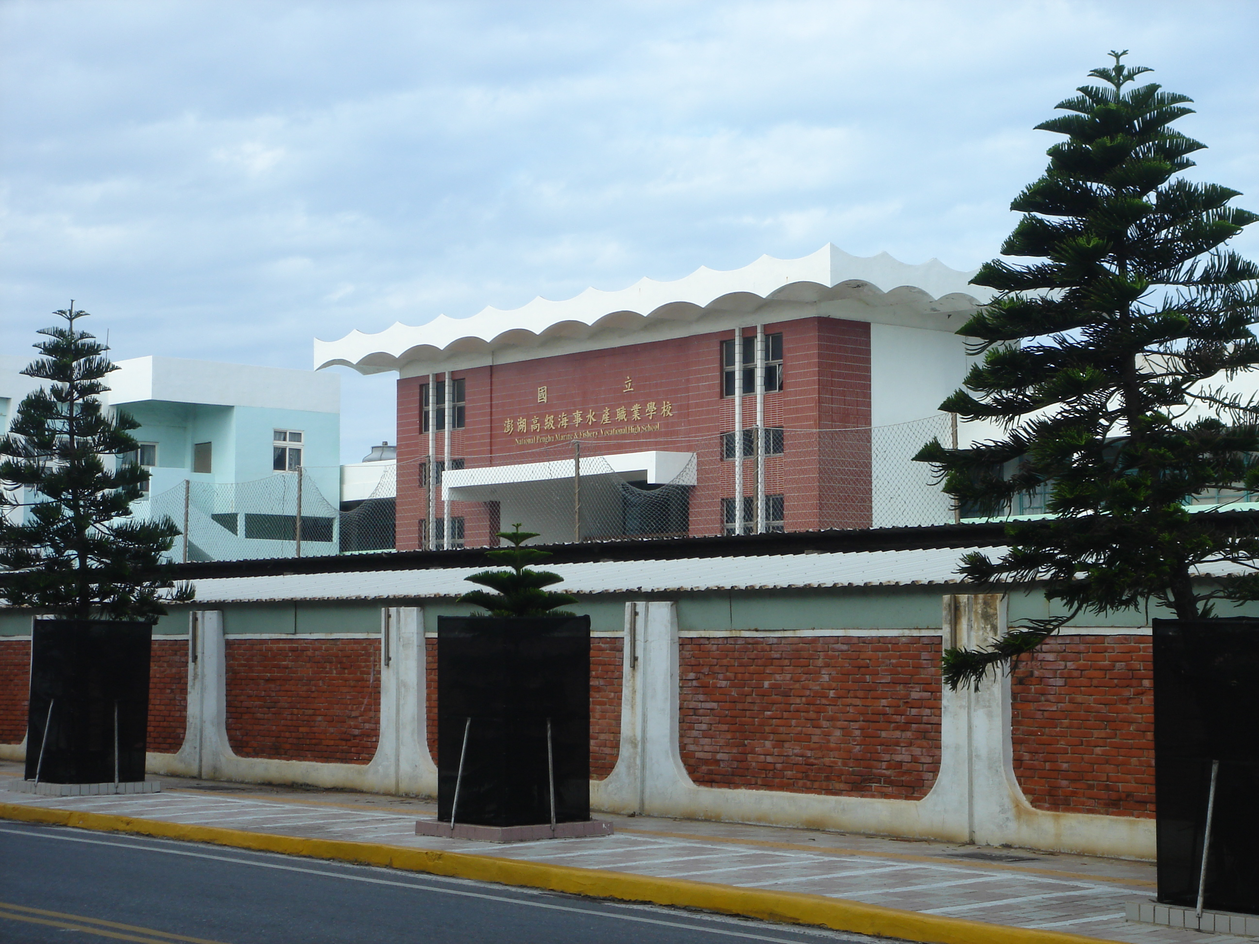 國立澎湖高級海事水產職業學校，位於臺灣澎湖縣馬公市民族路63號。